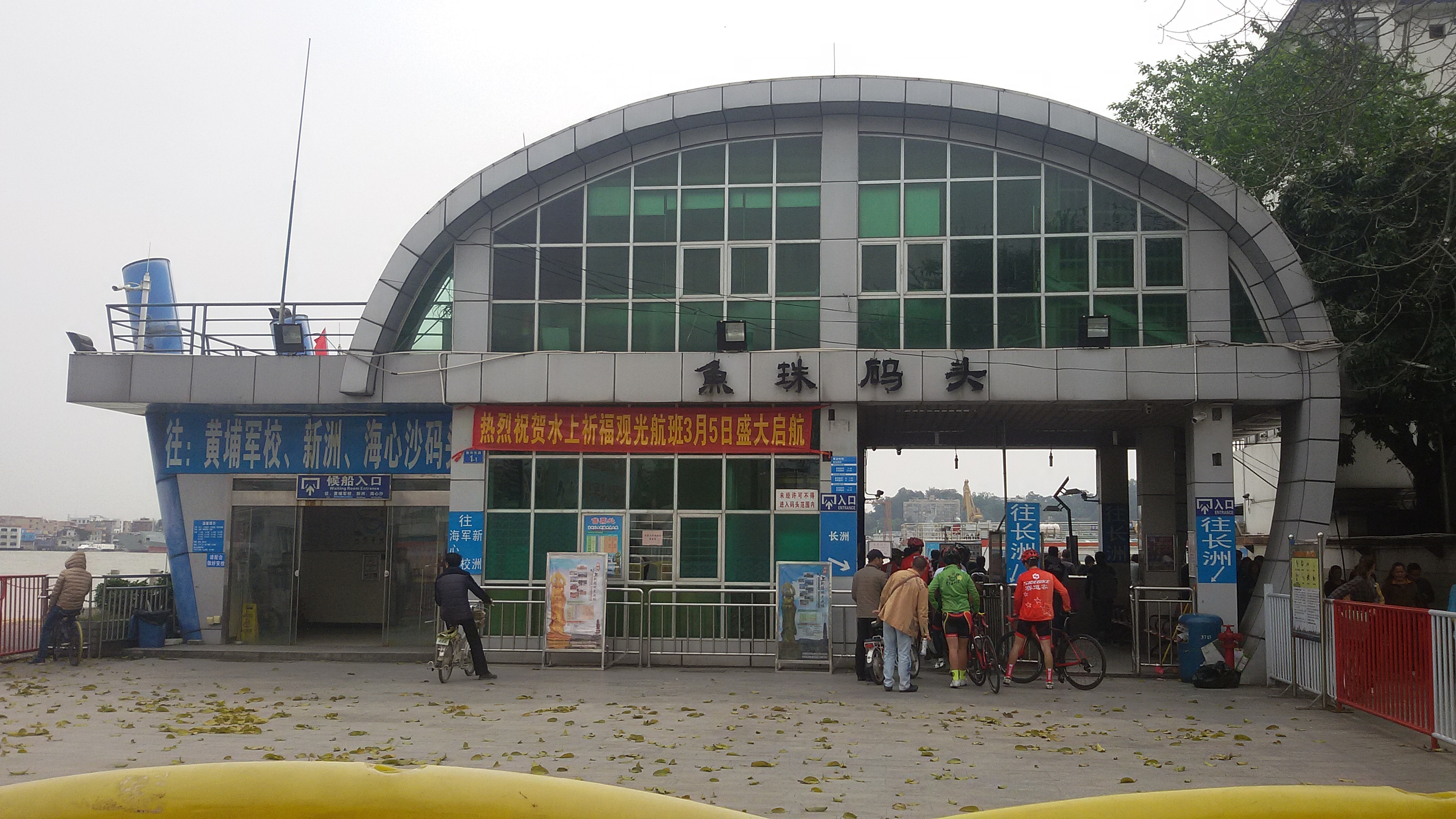 粵語: 鱼珠 码头